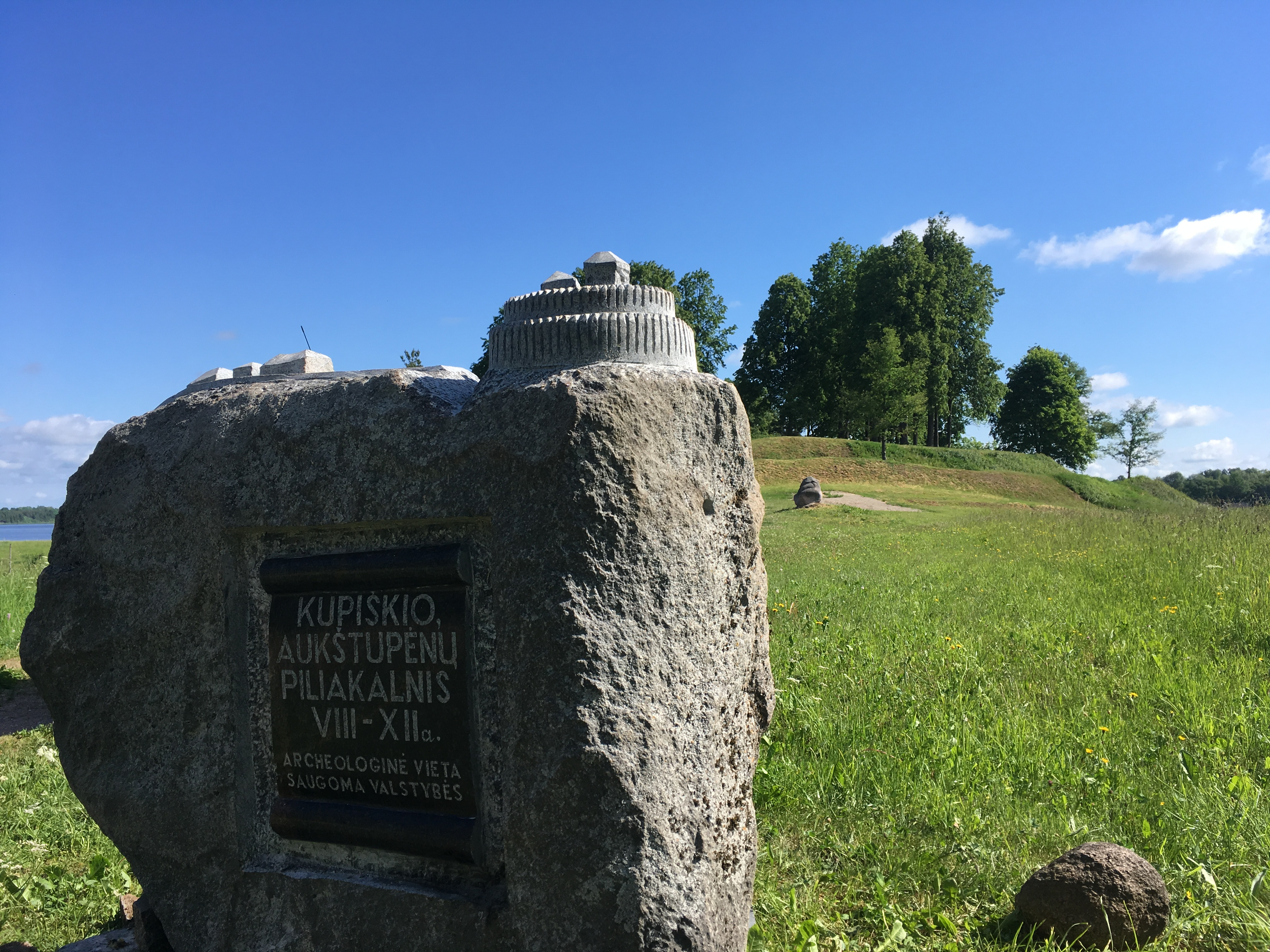 Kupiškio piliakalnis